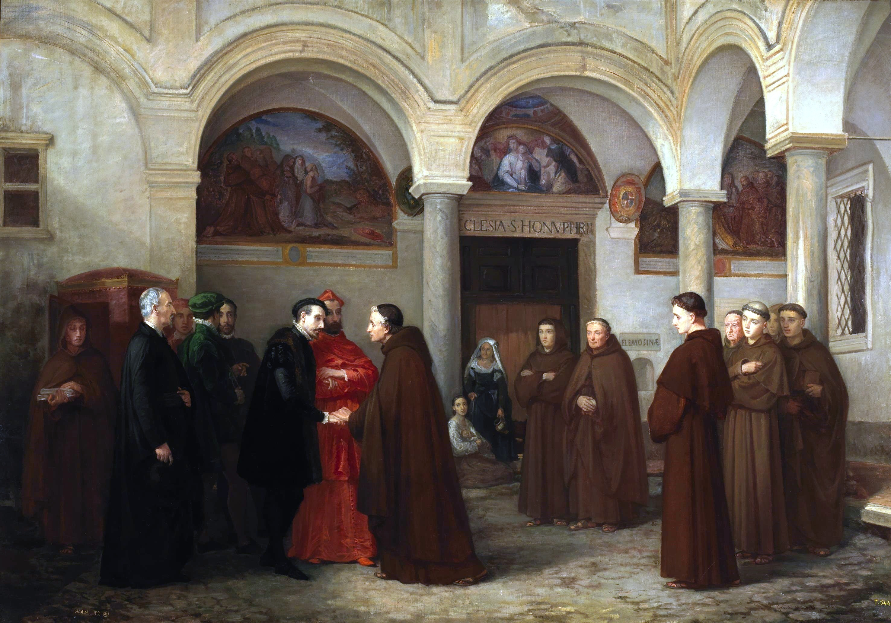 La obra representa el momento en que el poeta renacentista italiano Torquato Tasso (1544-1595) se retiró, poco antes de su muerte, al monasterio de San Onofre en el Janículo, donde sería enterrado posteriormente.